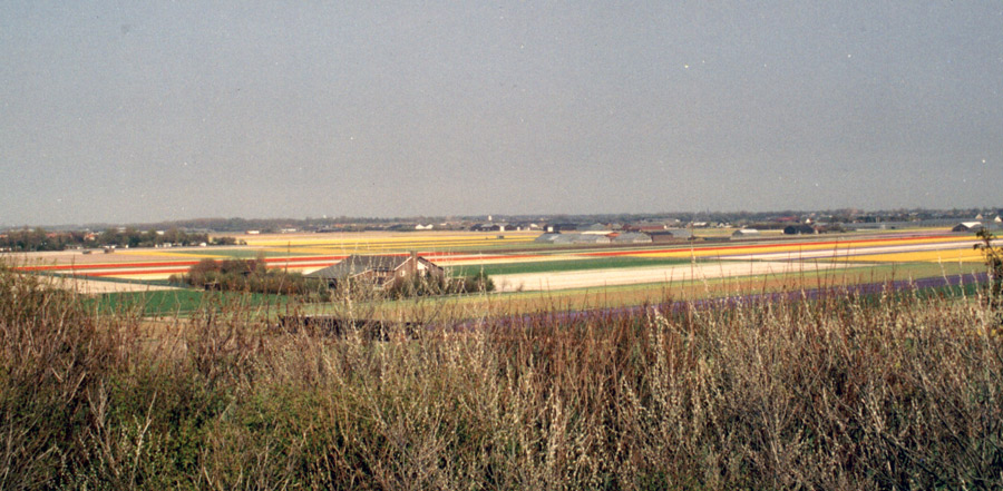 Description Bollenvelden bij Noordwijkerhout Nederland in 1996 toestemming voor verspreiding Bollenvelden bij Noordwijkerhout Nederland in 1996